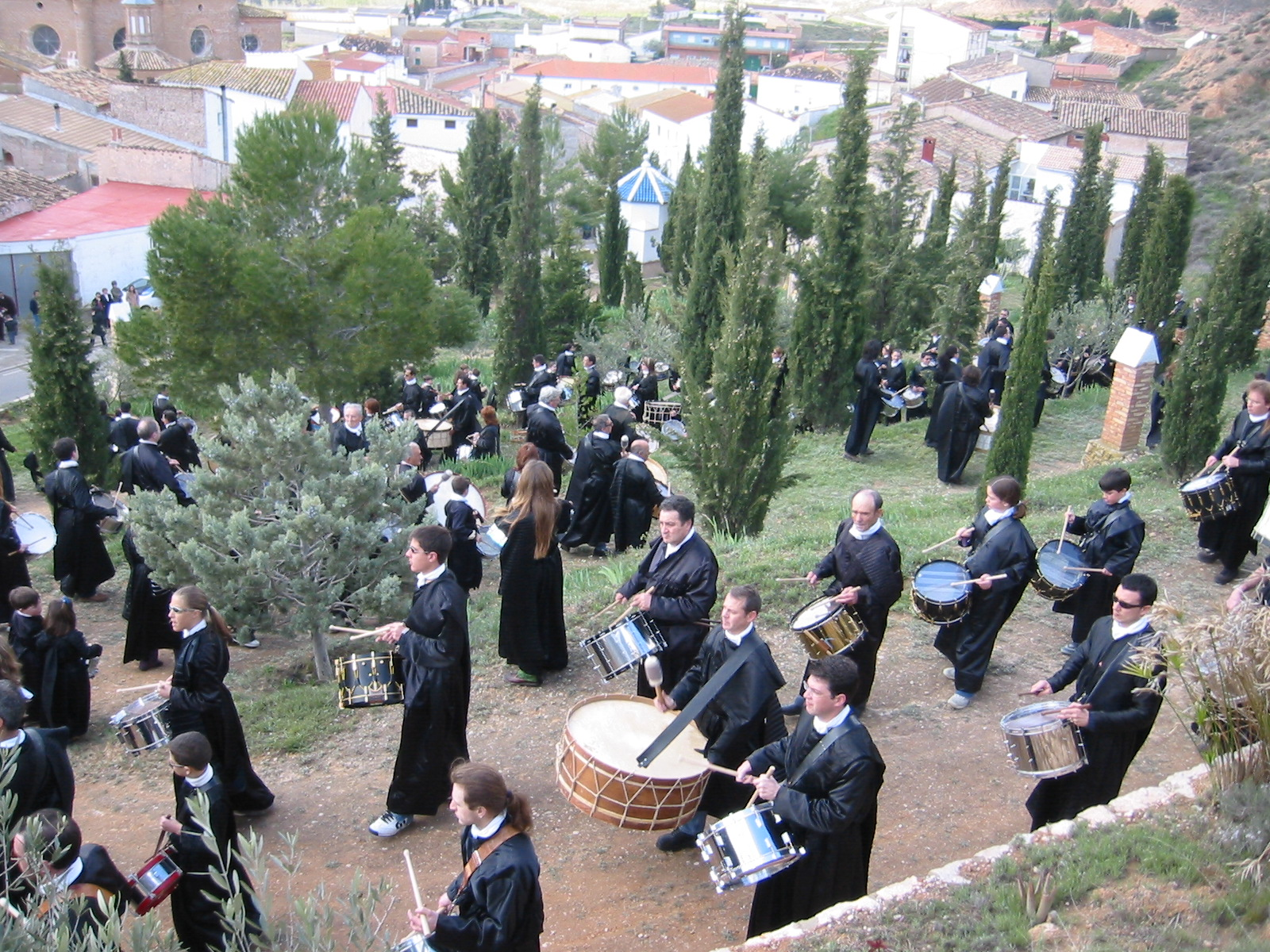 Procesión por el Calvario de Urrea de Gaén(Teruel). Ruta del Tambor y el Bombo del Bajo Aragón. Autor: Patricia Serrano